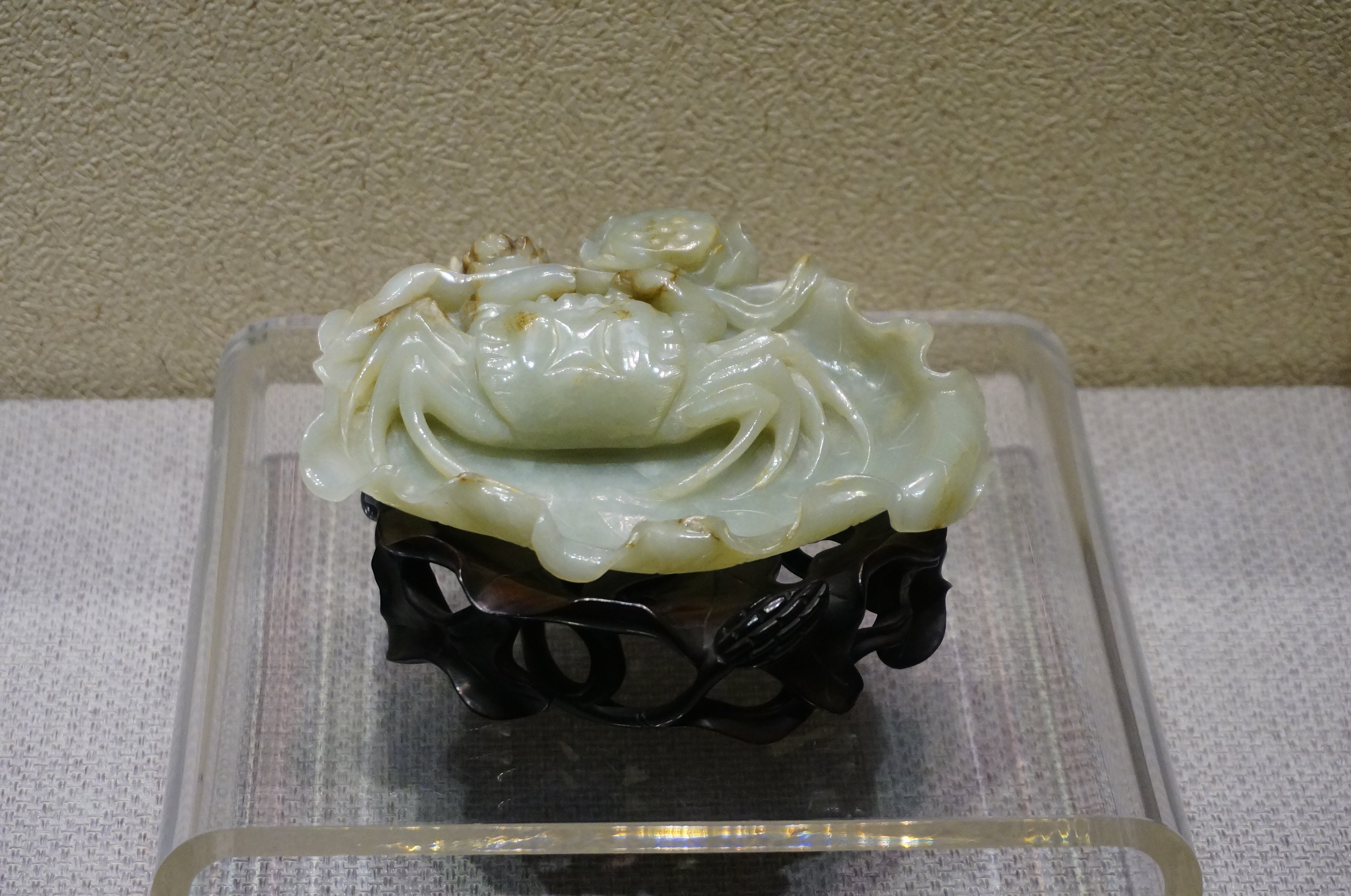 玉螃蟹洗，嘉兴博物馆藏。